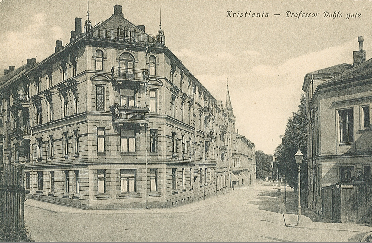 Østover i Professor Dahl gate fra krysset ved Eilert Sundts gate. På høyre side ses Professor Dahls gate 10 og på venstre side nr. 7, 5, 3 og 1. Ukjent fotograf, ca. 1915–20. Fra Byhistorisk samling hos Oslo Museum.